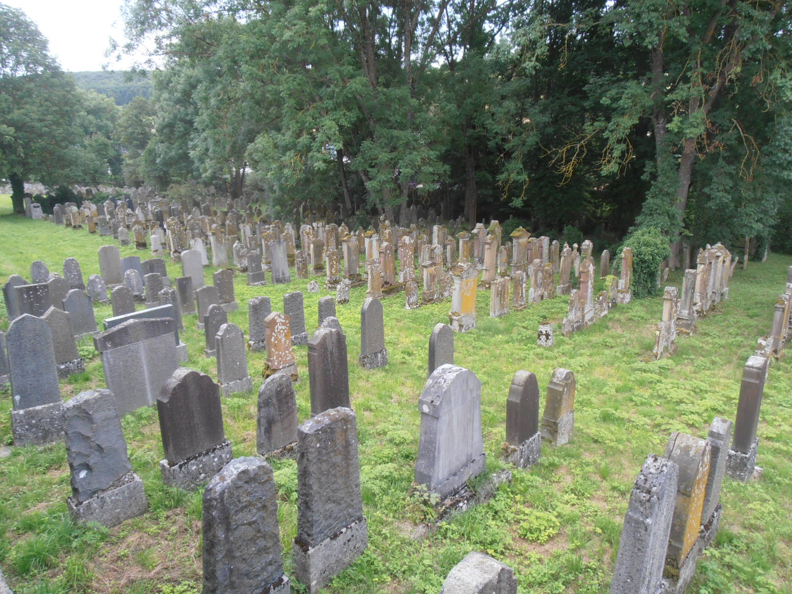 Mazewot im jüdischen Friedhof Unterbalbach.